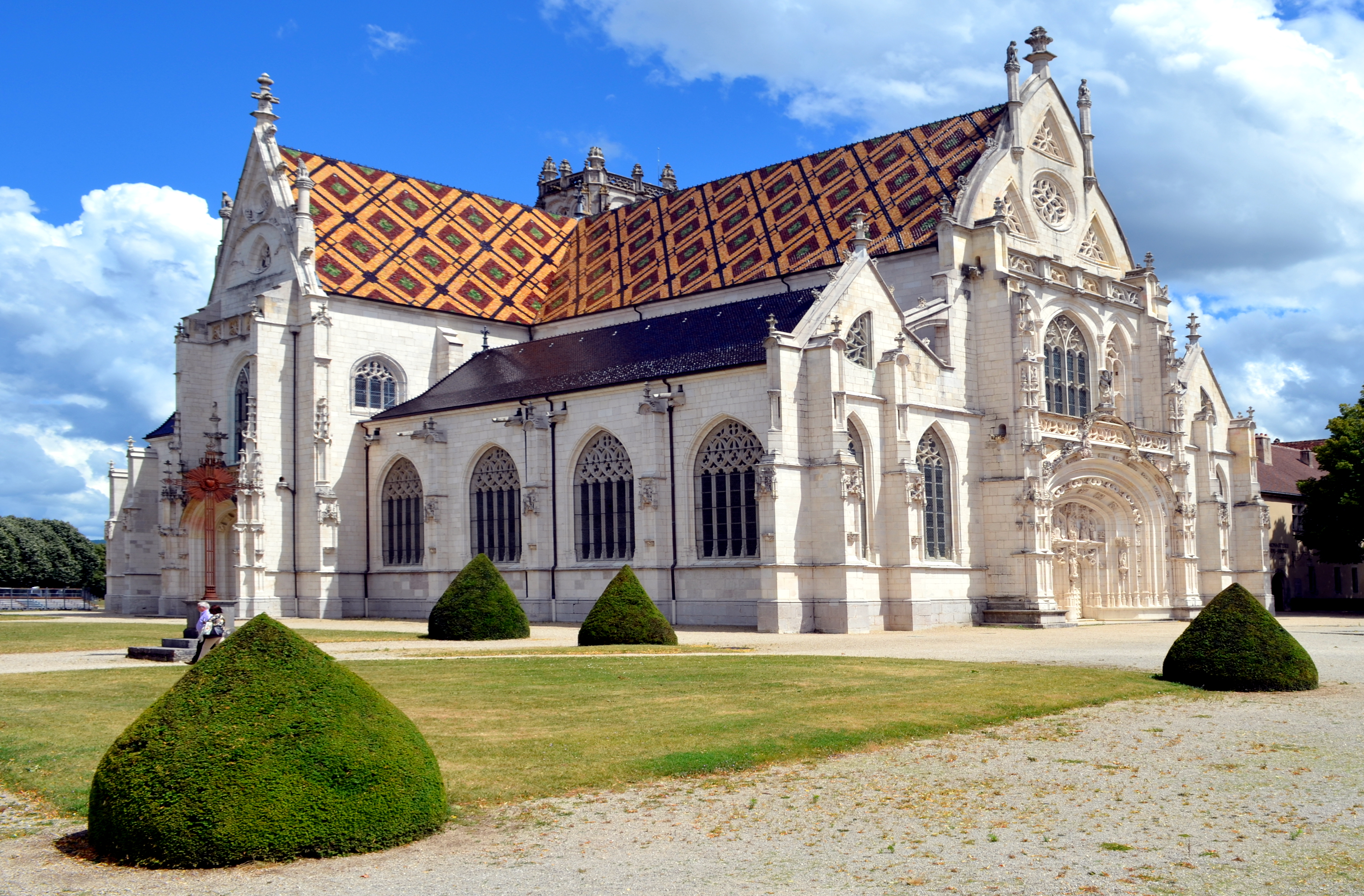 L'église de Brou en juin 2014.